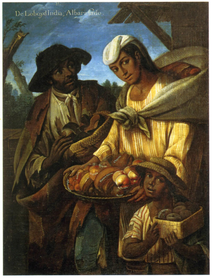 Pintura de Castas,11. De lobo e india – Albarazado.